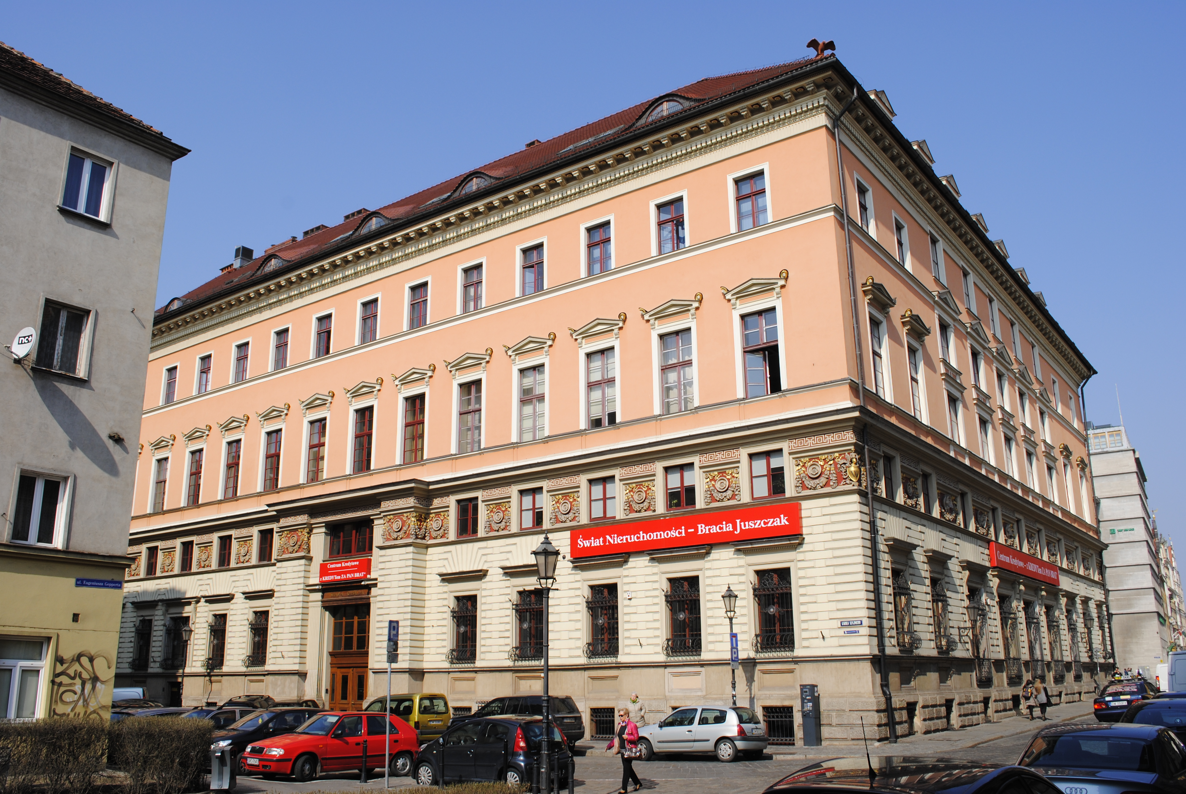 Rückansicht der alten Börse in Breslau